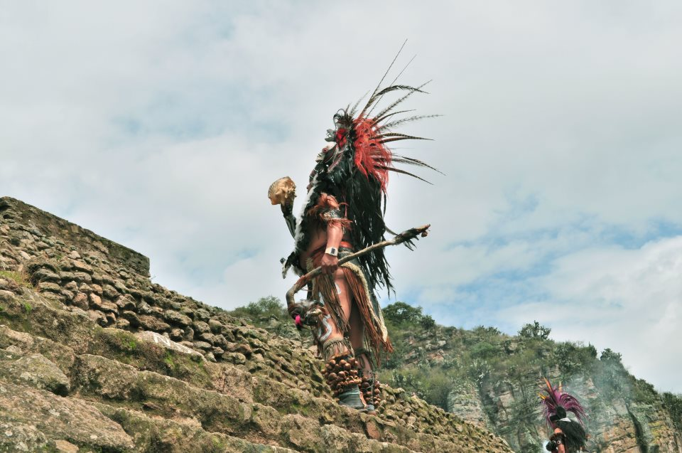 piramide principal de huapalcalco tulancingo hgo